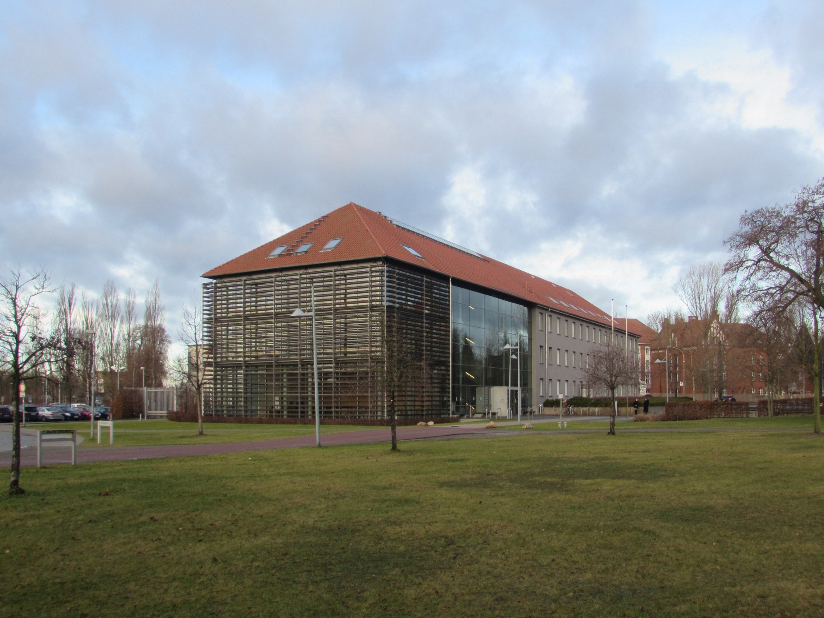 amtsgericht brandenburg, ehemaliger kasernenbau magdeburger straße